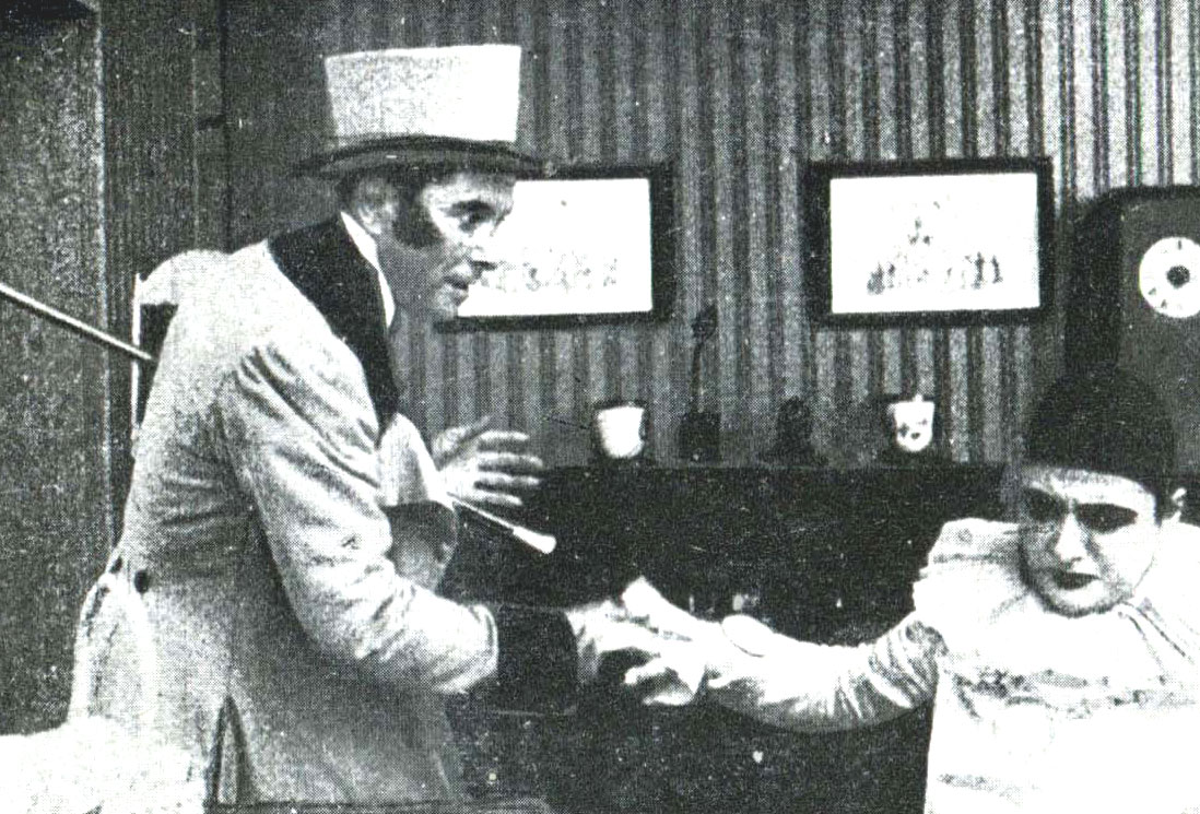 Inquadratura con Amedeo Ciaffi e Francesca Bertini da "L'Histoire d'un Pierrot", film muto 1914 (B. Negroni)